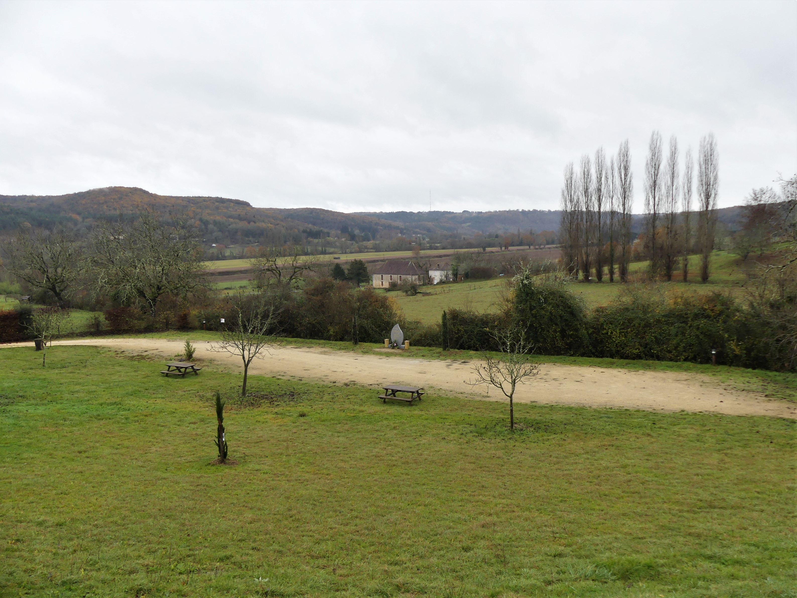 Paysage au sud du bourg de Saint-Cirq, Dordogne, France. Au fond, les coteaux sont situés sur la commune de Campagne.